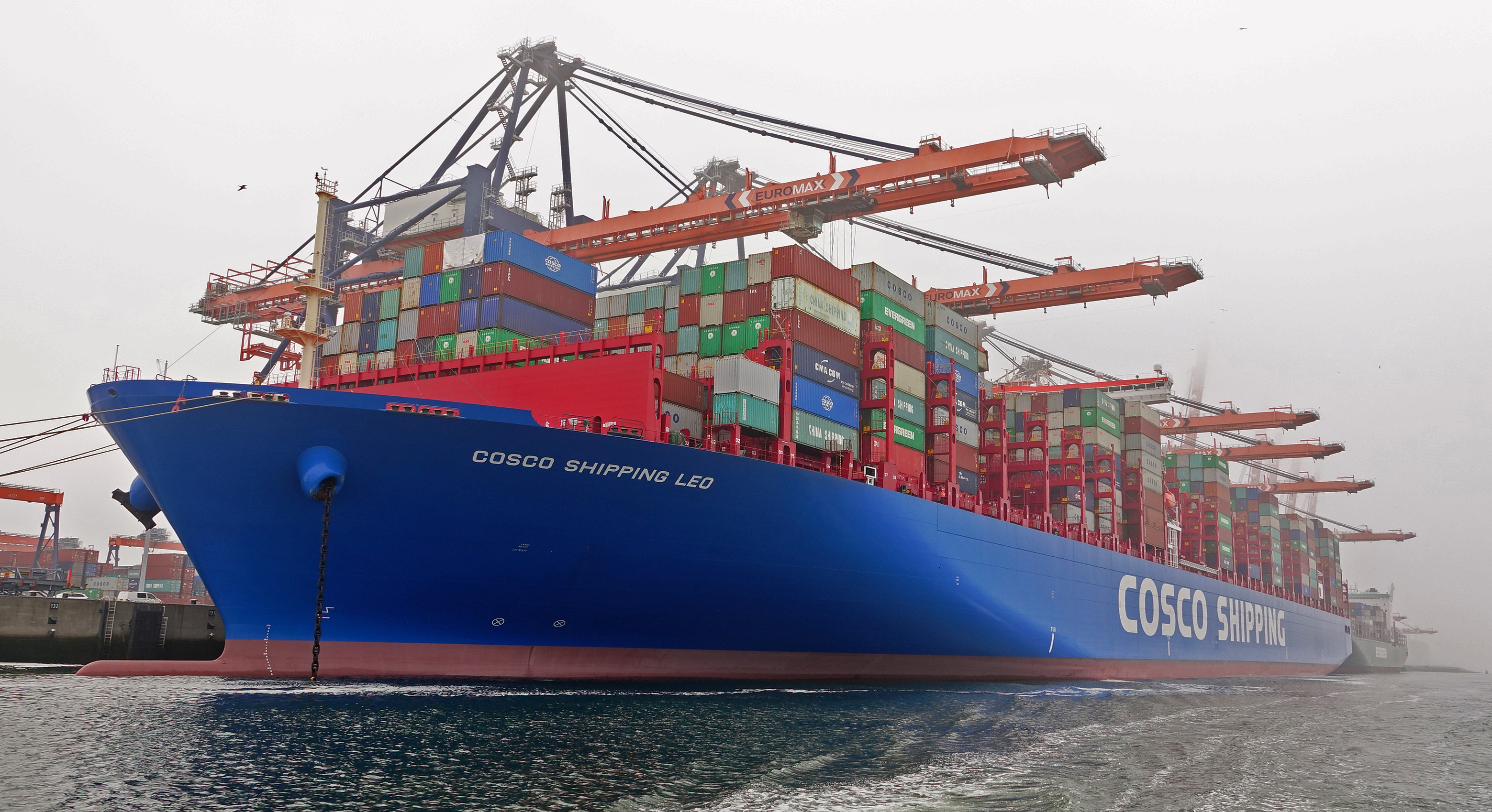 Euromax terminal Yangtzehaven 30-5-2018 , eerste bezoek aan Rotterdam